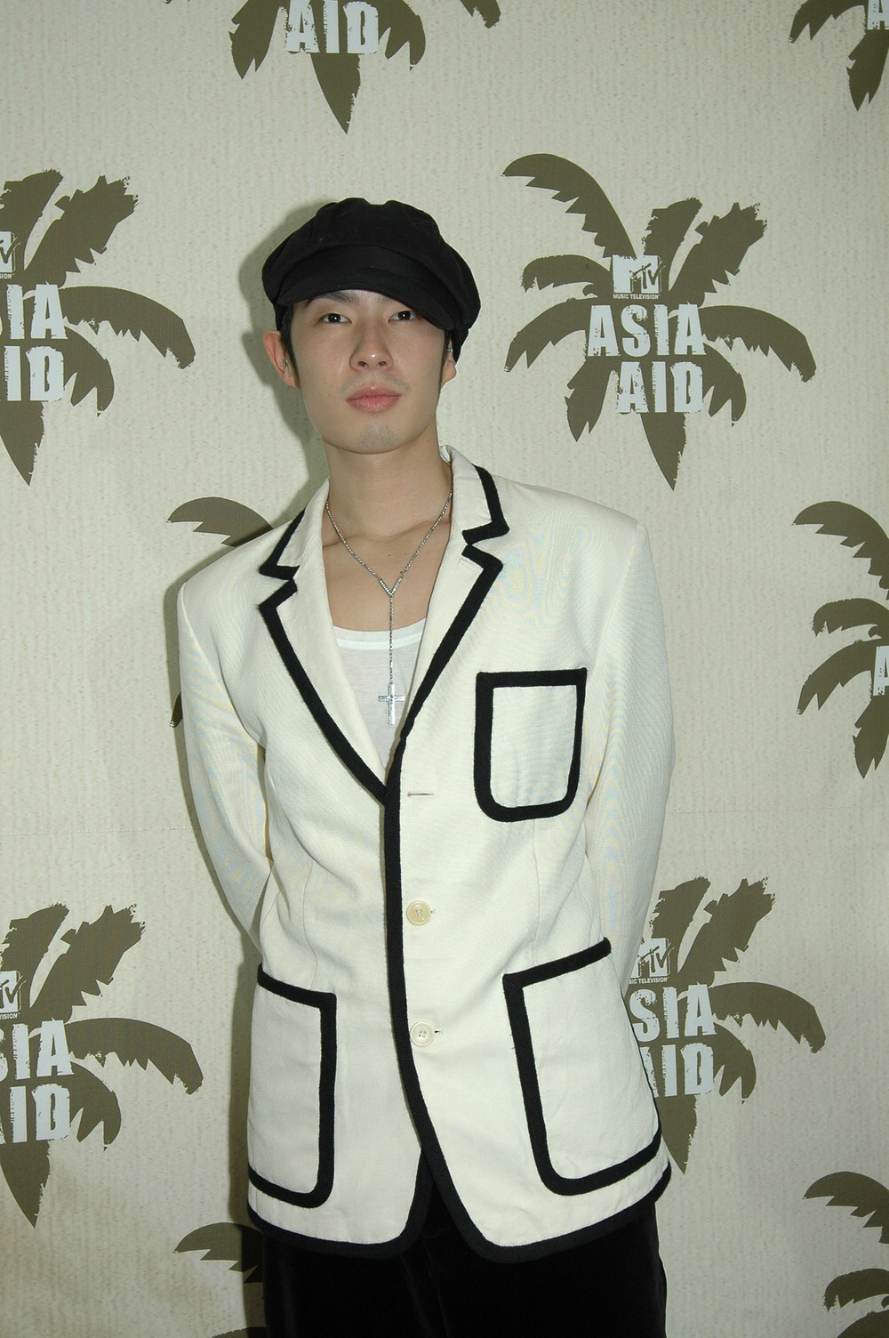 Vanness Wu @ MTV Asia Aid 2005.